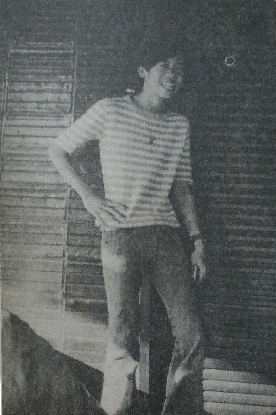 วงศ์เมือง นันทขว้าง เมื่ออยู่ภายในบ้าน